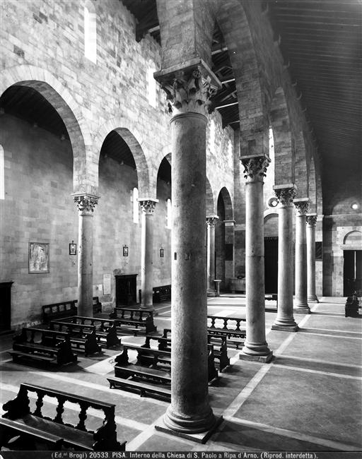 Brogi, Carlo (1850-1925), "Pisa - Interno della Chiesa di S. Paolo a Ripa d'Arno". Numero di catalogo: 20533.